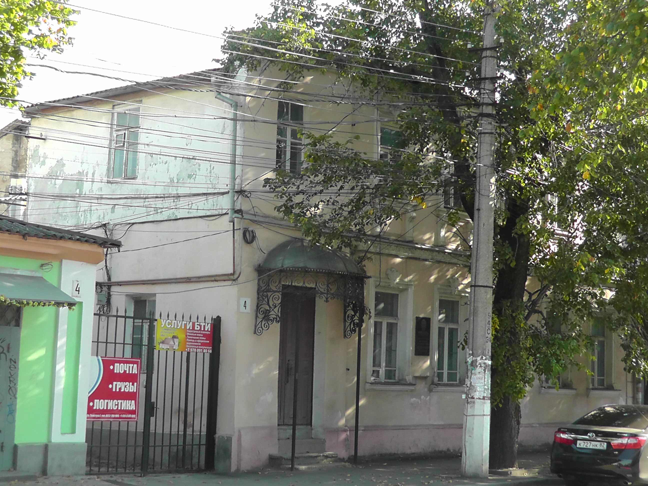 Будинок Фесенка (будинок, в якому жив Л. Н. Толстой), XIX ст., Сімферополь, вул. Толстого, 4